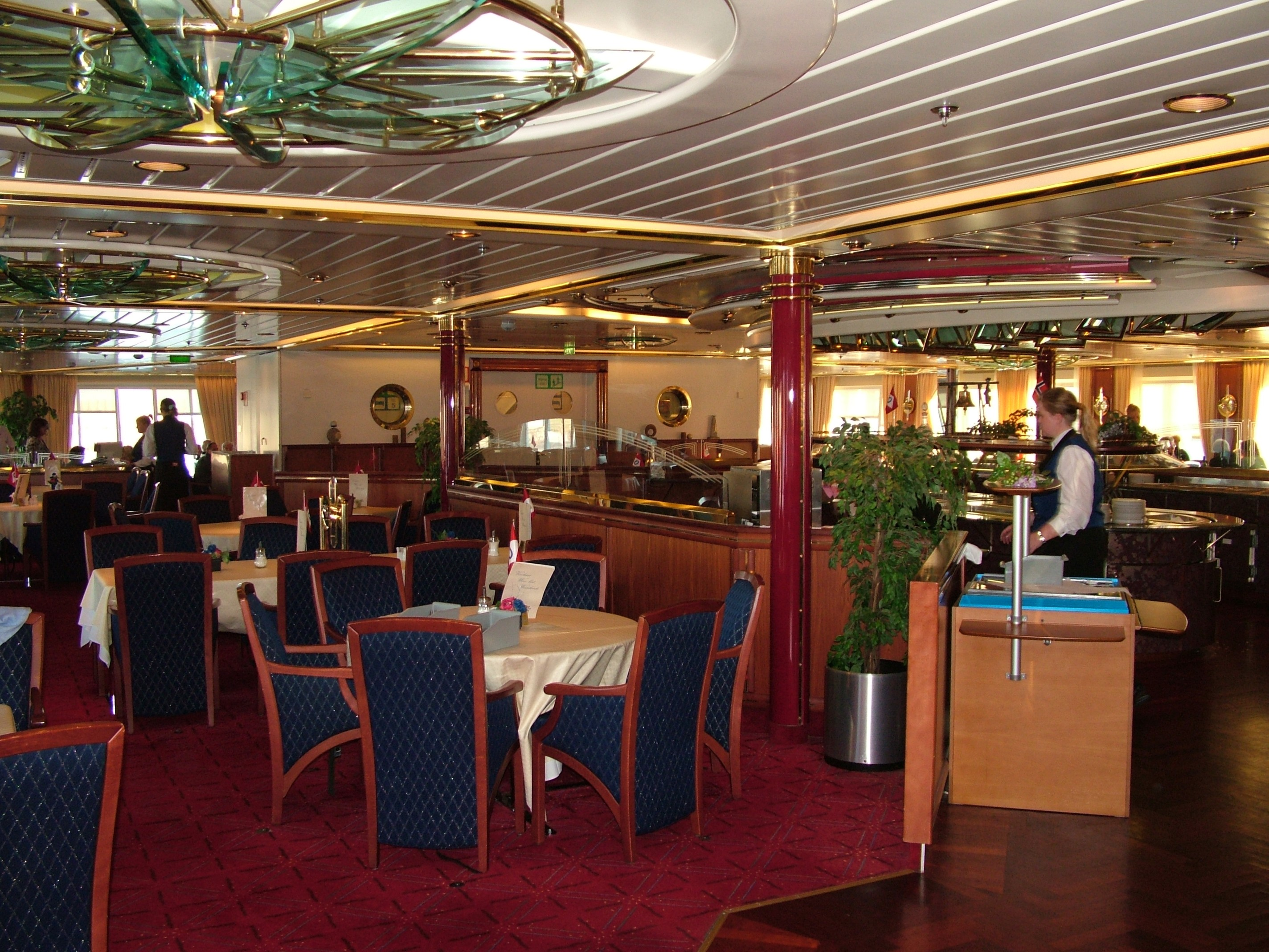 MS Nordnorge, ein Hurtigrutenschiff, das Restaurant